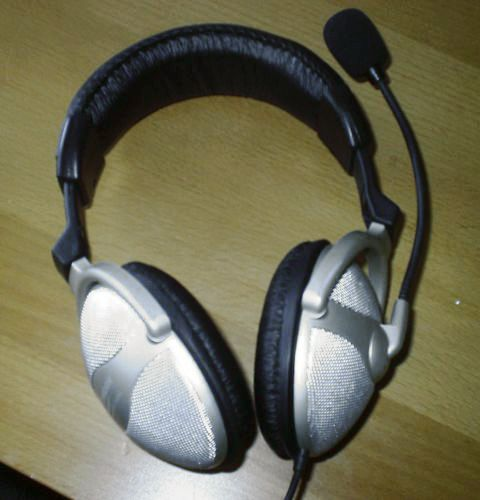 Headset